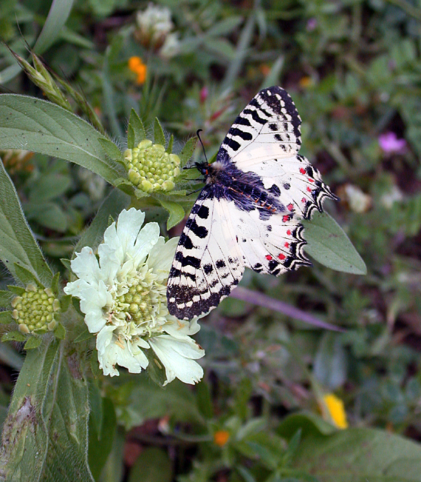 Allancastria cerisyi speciosa Stichel, 1907 (צבעוני קשוט), Mount Carmel, Israel, April 12, 2006.